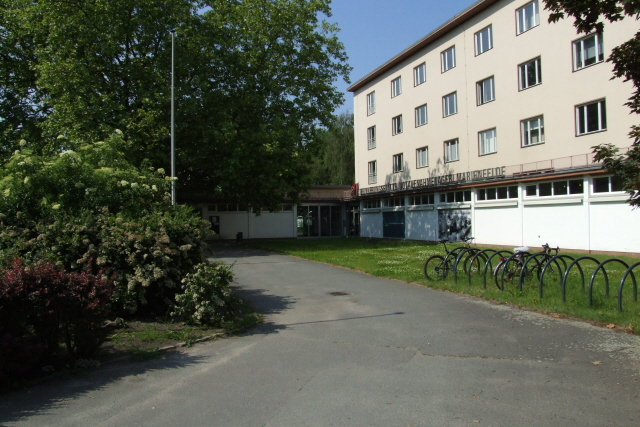 Eingangsbereich des Notaufnahmelagers Marienfelde mit Zugang zur Erinnerungstätte Fotograf: Harald Rossa Datum: 10.6.2006 Der Eingang zum Notaufnahmelager Marienfelde Fotograf: Harald Rossa Date: June 2006